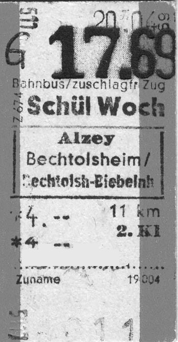 Schülerwochenkarte von Bechtolsheim nach Alzey auf der Strecke Amiche Day of Issue: 17 Kalenderwoche 1969